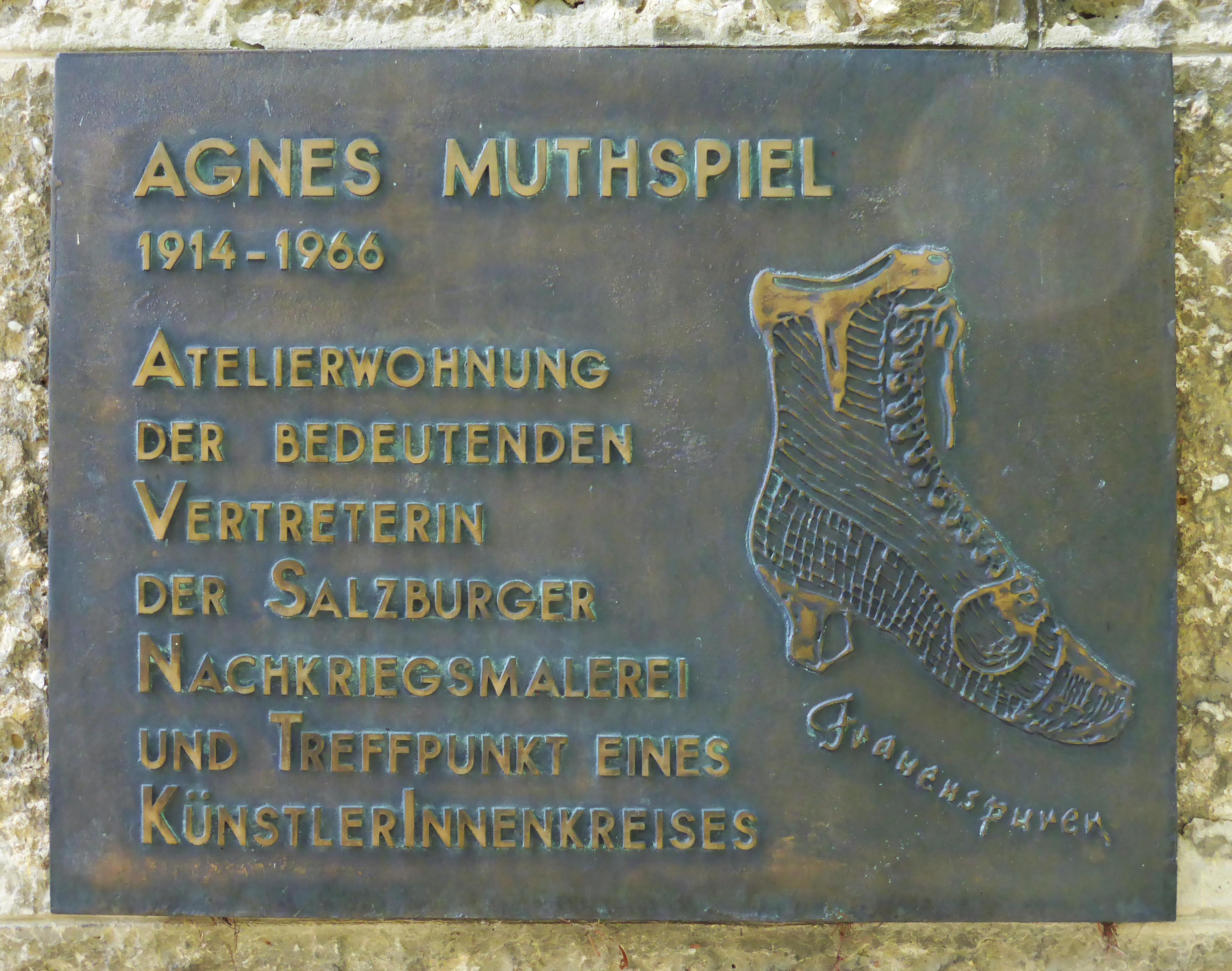 Abts-Thurm auf dem Mönchsberg, Salzburg. Gedenktafel (Frauenspuren) - Agnes Muthspiel.